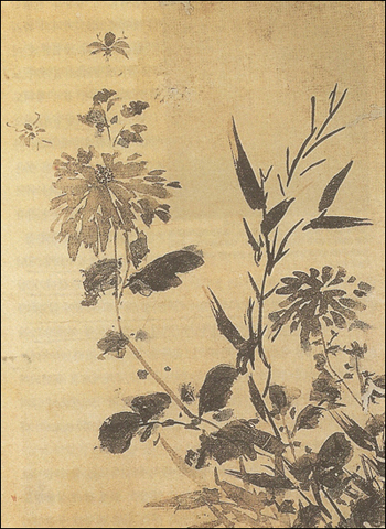 朴趾源作、墨竹圖